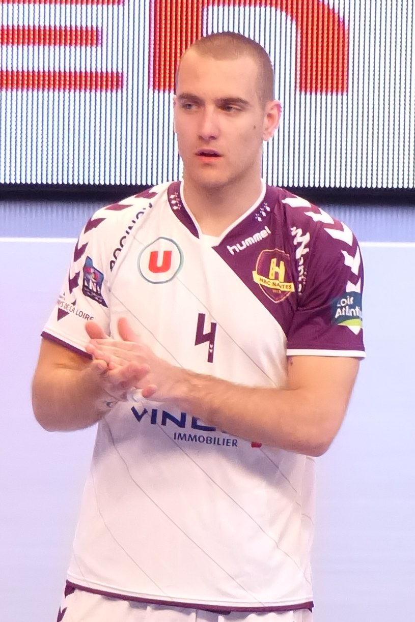 Stefan Vujic, demi-centre du club de handball du HBC Nantes, lors du match face au PSG Handball le 10 avril 2014.